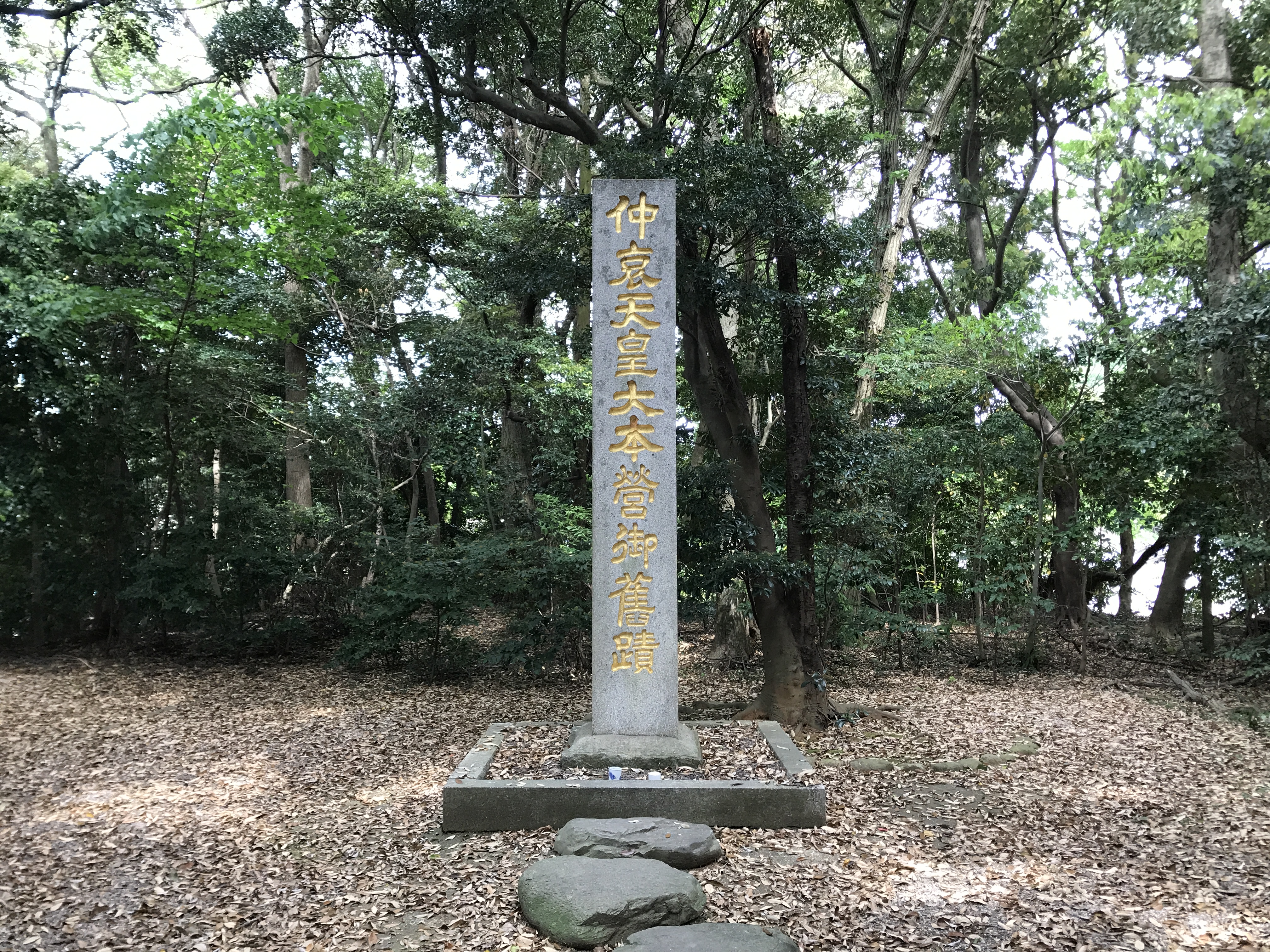 香椎宮の古宮跡